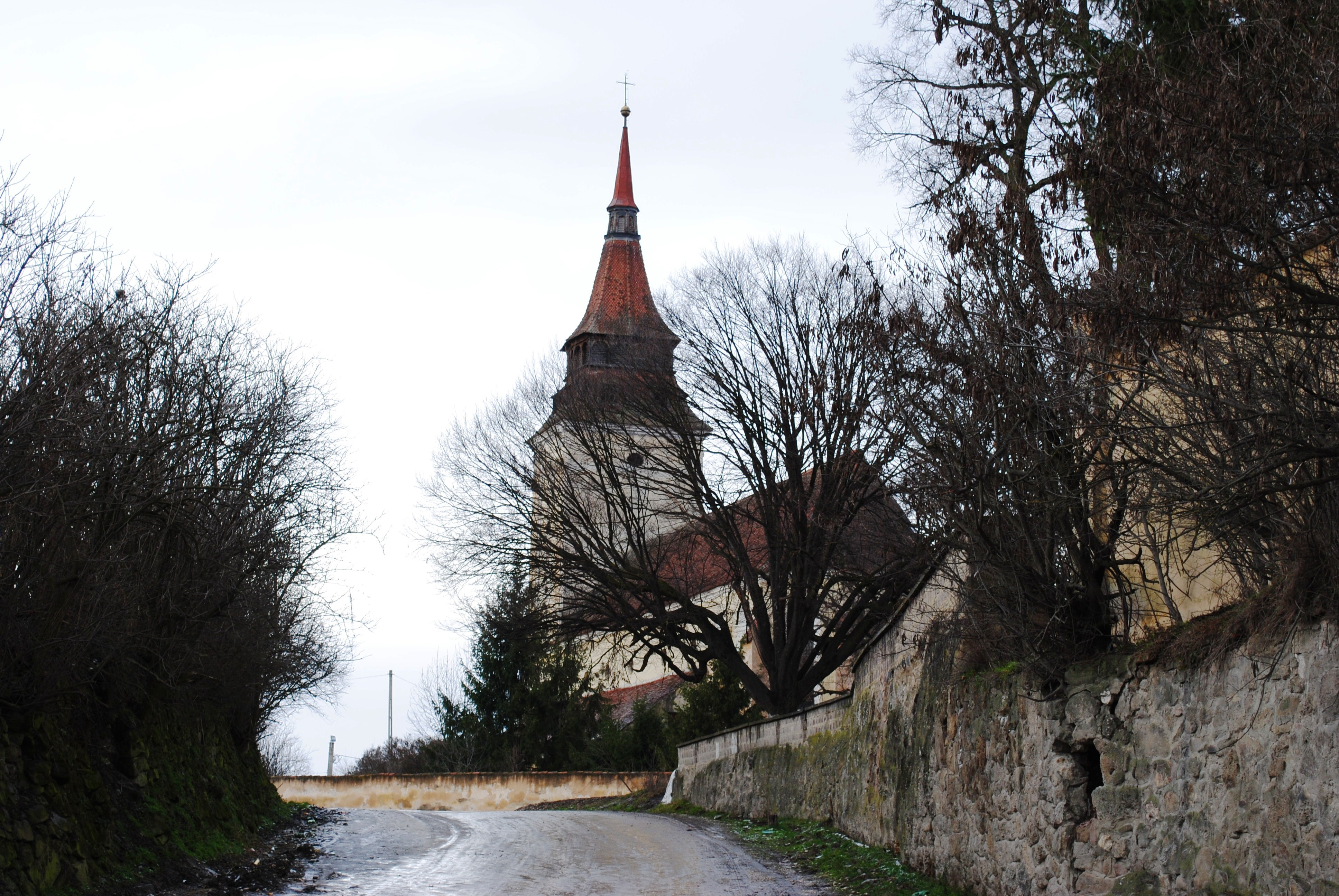 Ansamblul bisericii evanghelice, sec. XIII-XIX